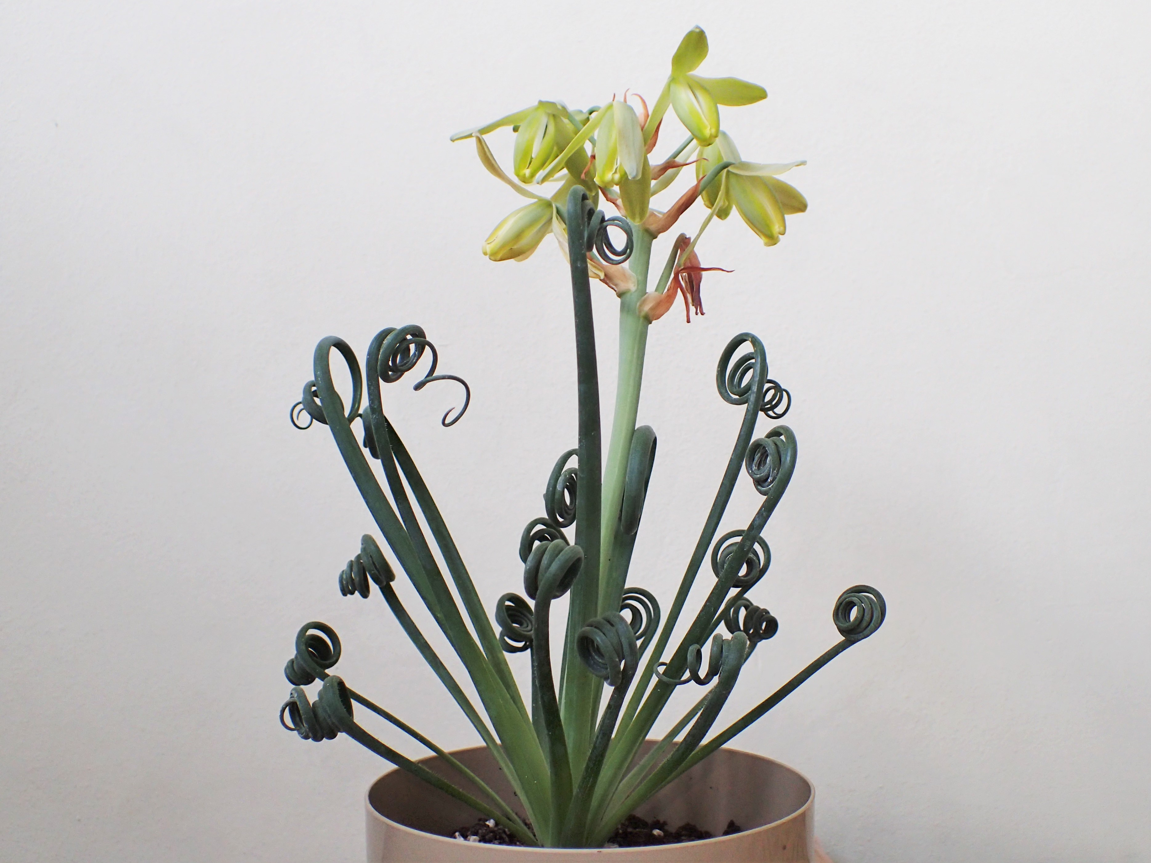 Albuca spiralis 'Frizzle Sizzle' as pot plant in Szczecin, NW Poland